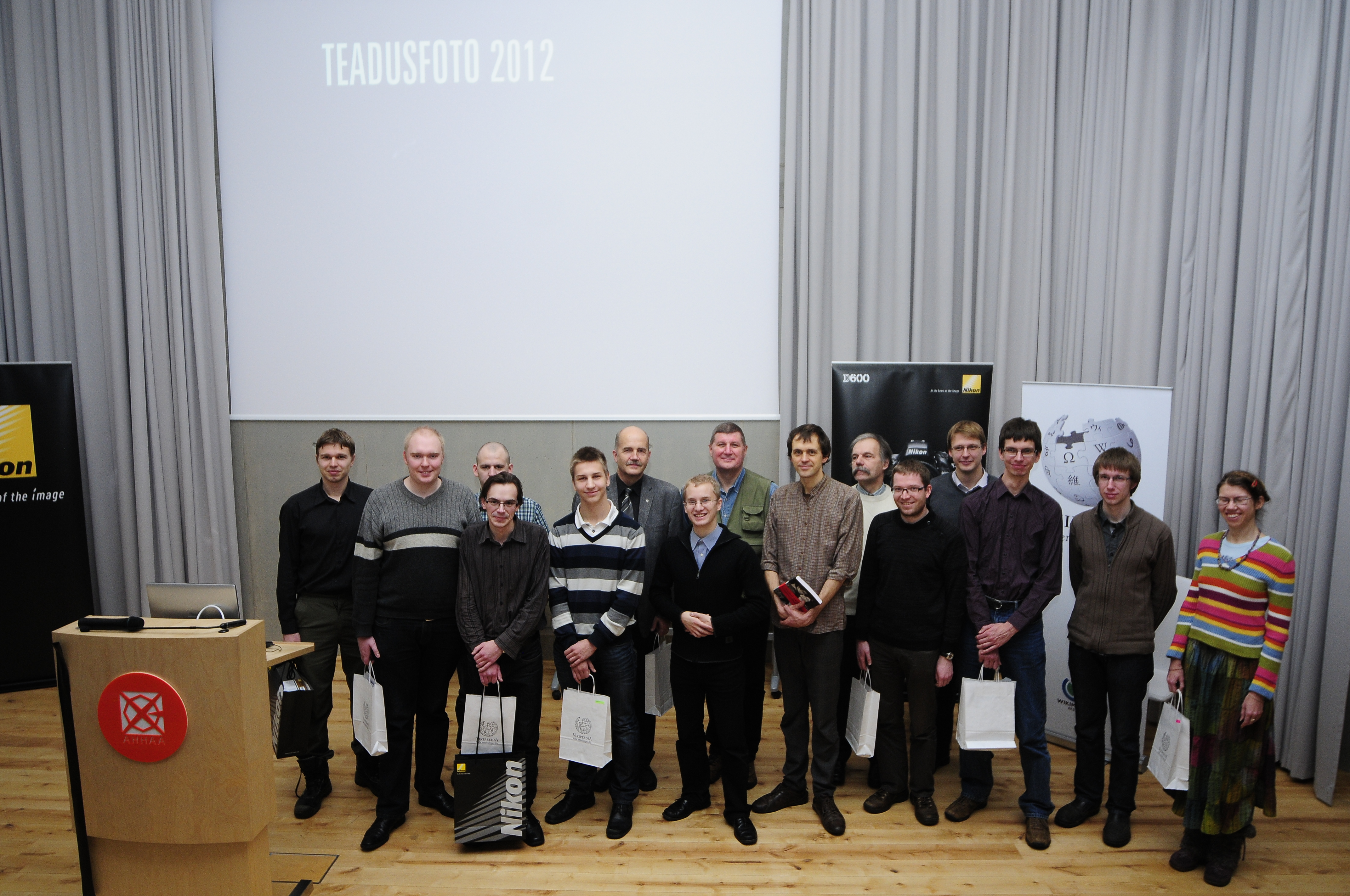 Teadusfoto 2012 võitjad.